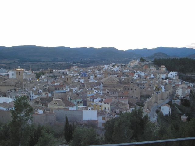 Vista general de Segorbe desde su castillo